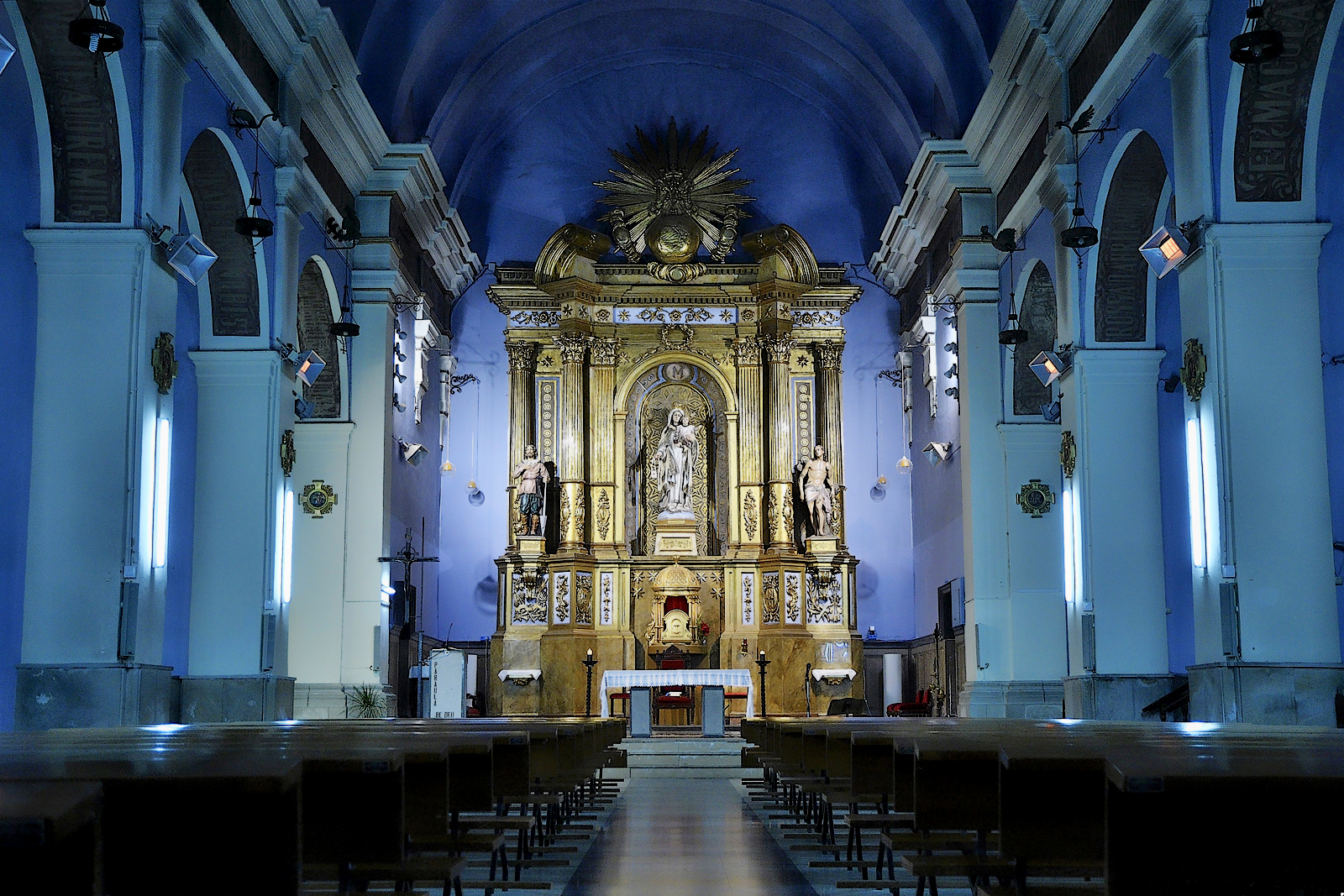 Altar de la iglesia de la Mare de Déu de la Mercè d´Almacelles (Lleida)